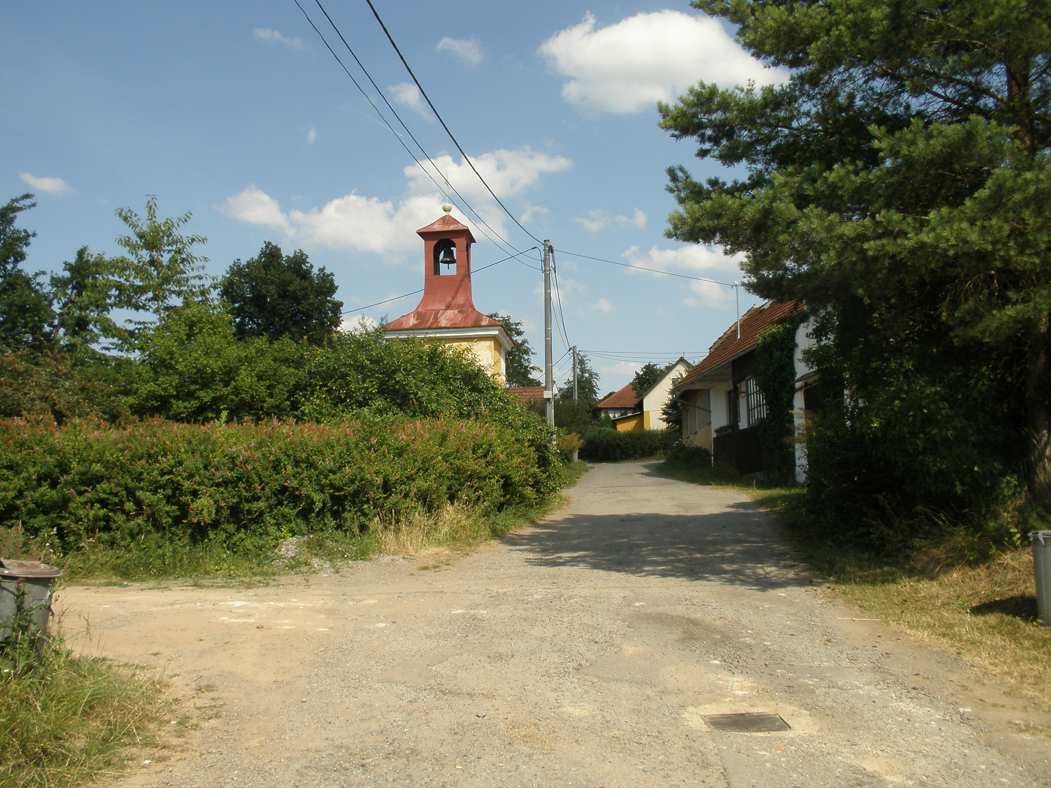 Kněževísko, centrální část obce s kaplí